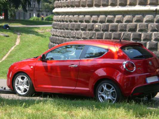 Alfa Romeo MiTo durante il set pubblicitario nei pressi del Castello Sforzesco di Milano